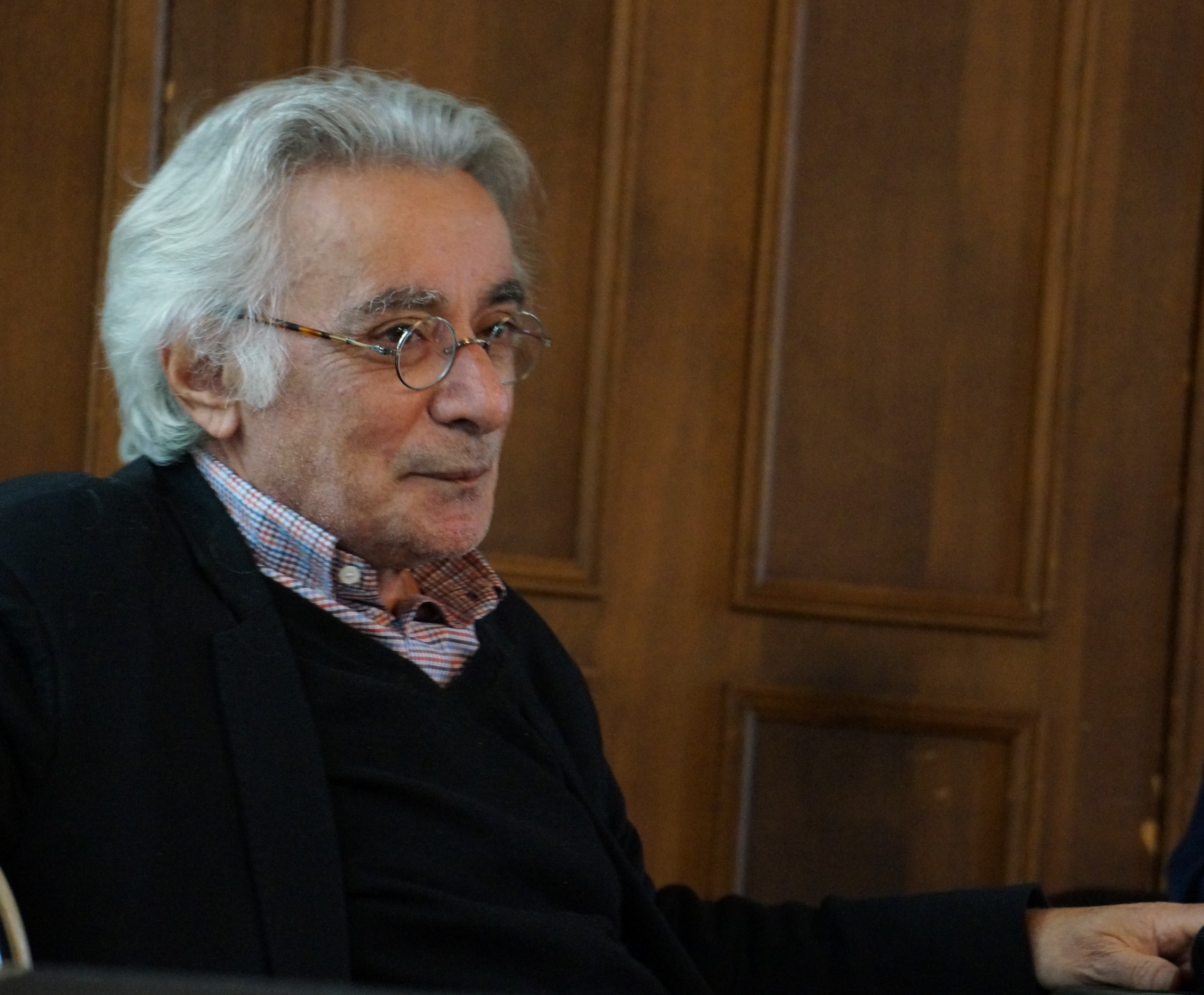 lors du 9e Festival Interpol'art.